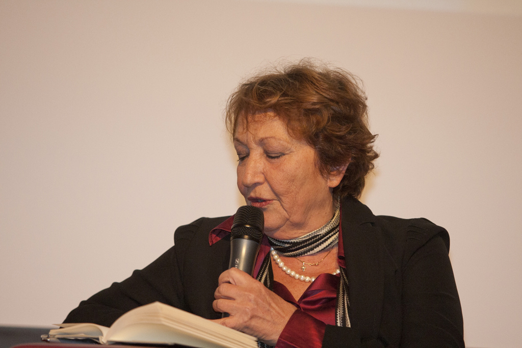 Jole Zanetti